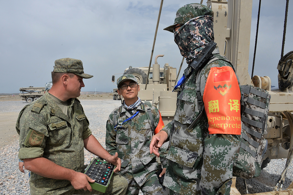 Российские сапёры на конкурсе «Безопасный маршрут» экипированы в новейший комплект разминирования ОВР-2-02.